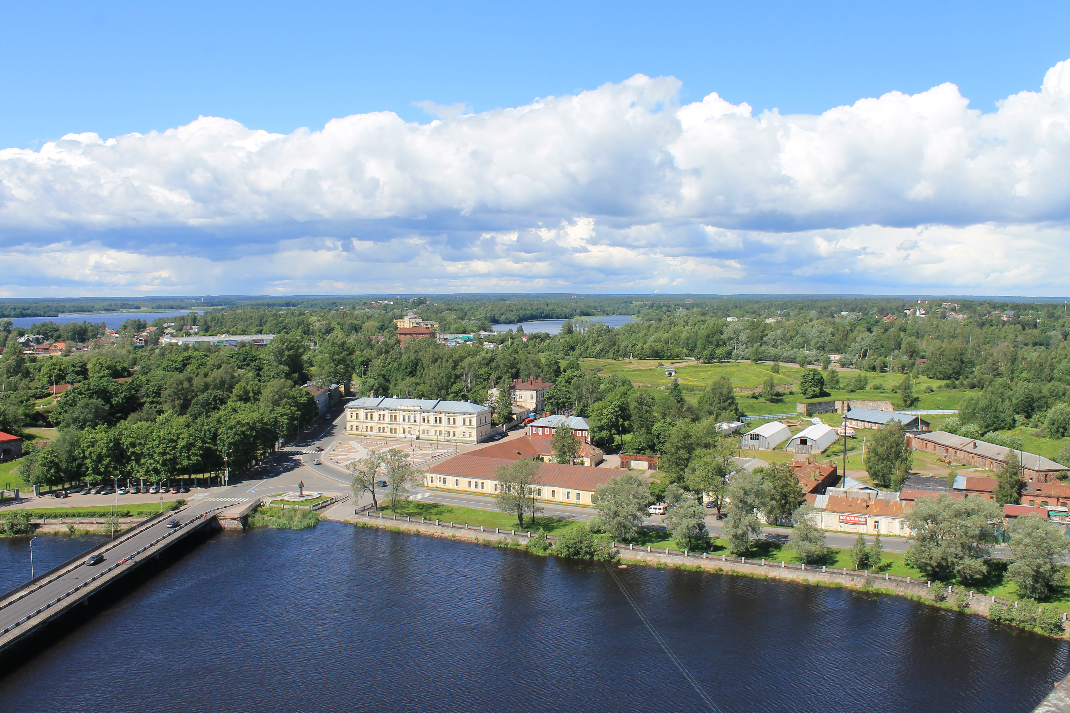 Инженерный деловой двор (Санкт-Петербург и Лен.область, Выборг, набережная Петровская, 9-б)